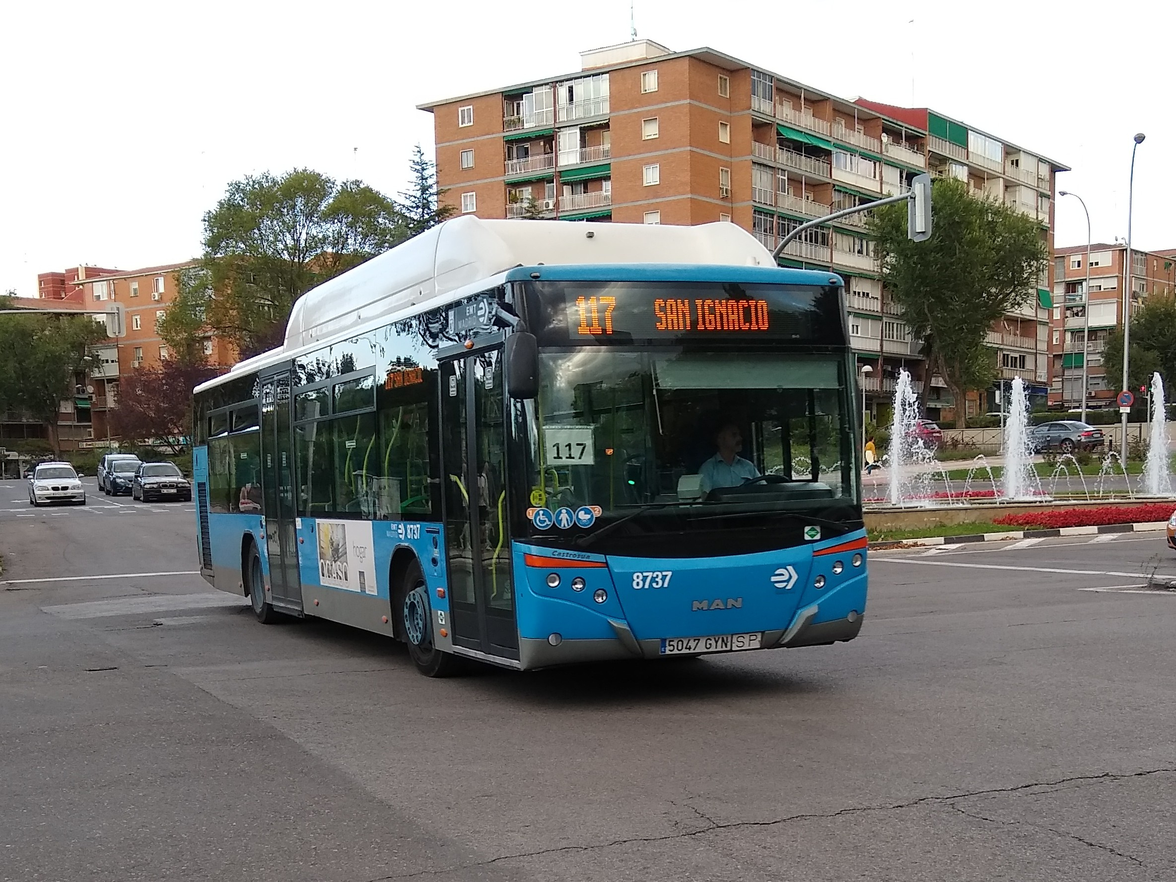 Un autobús de la EMT Madrid